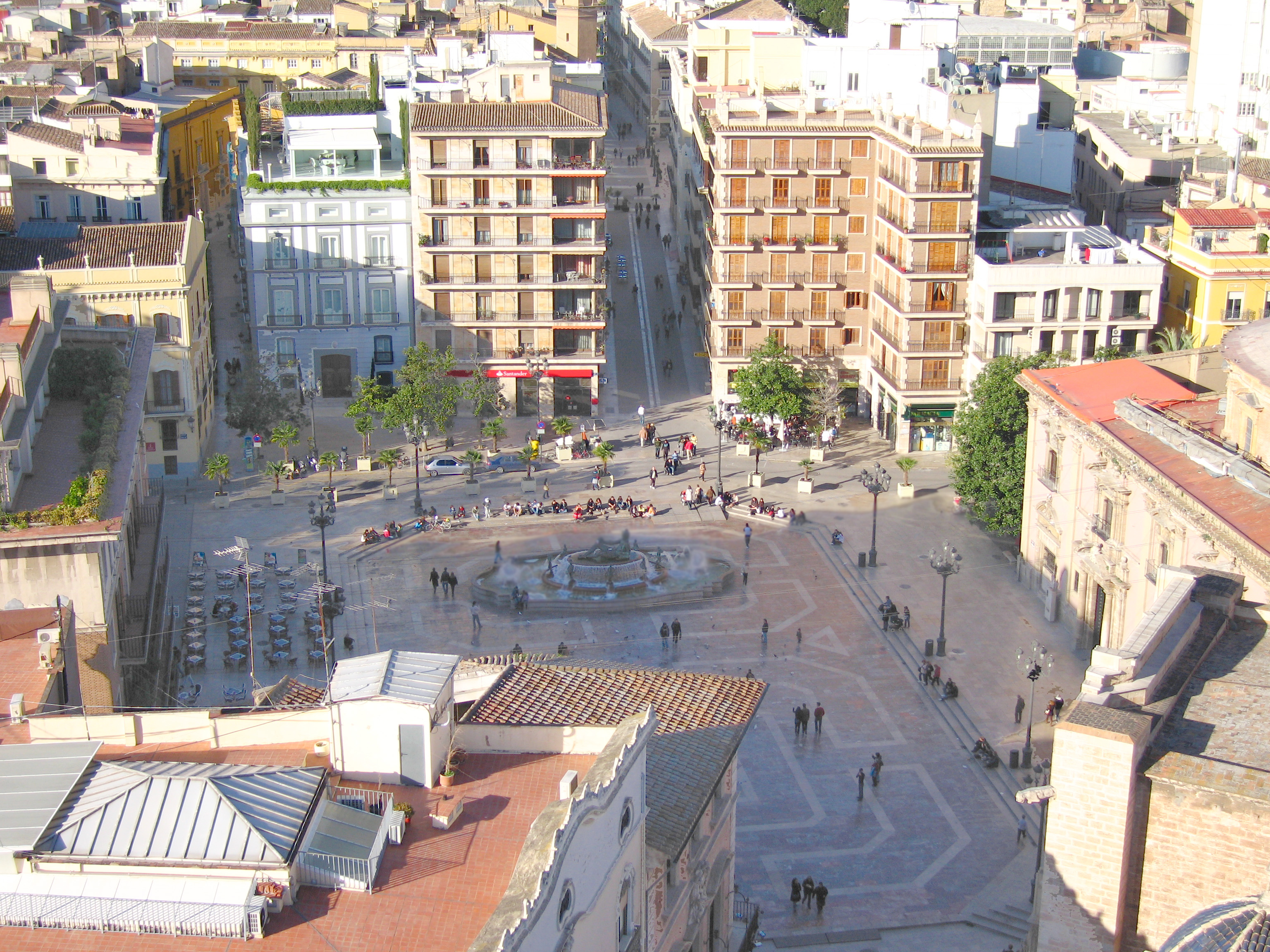 Plaça de la Marededéu de València